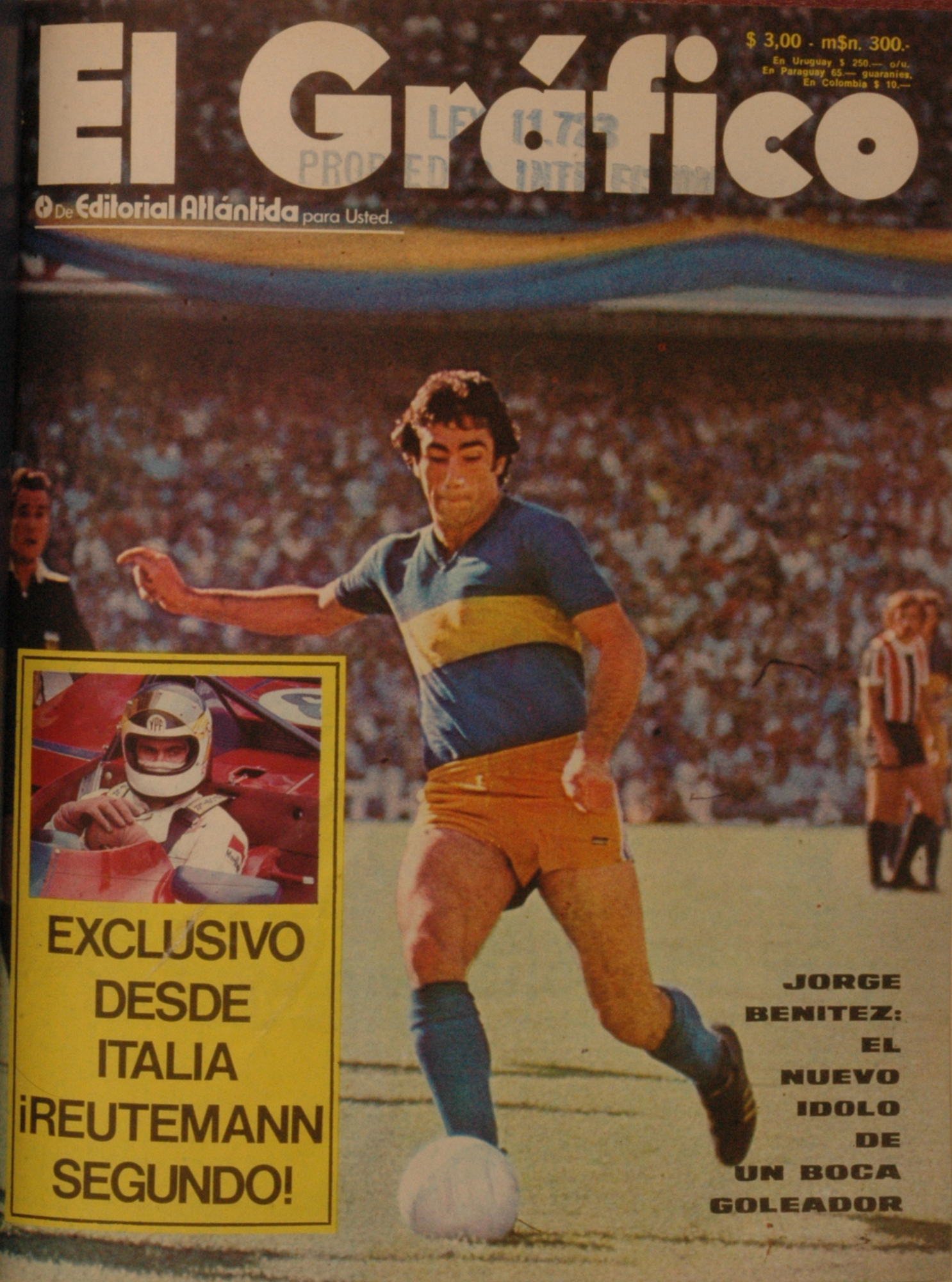 El Grafico del 27 de Marzo de 1973. Edicion 2790